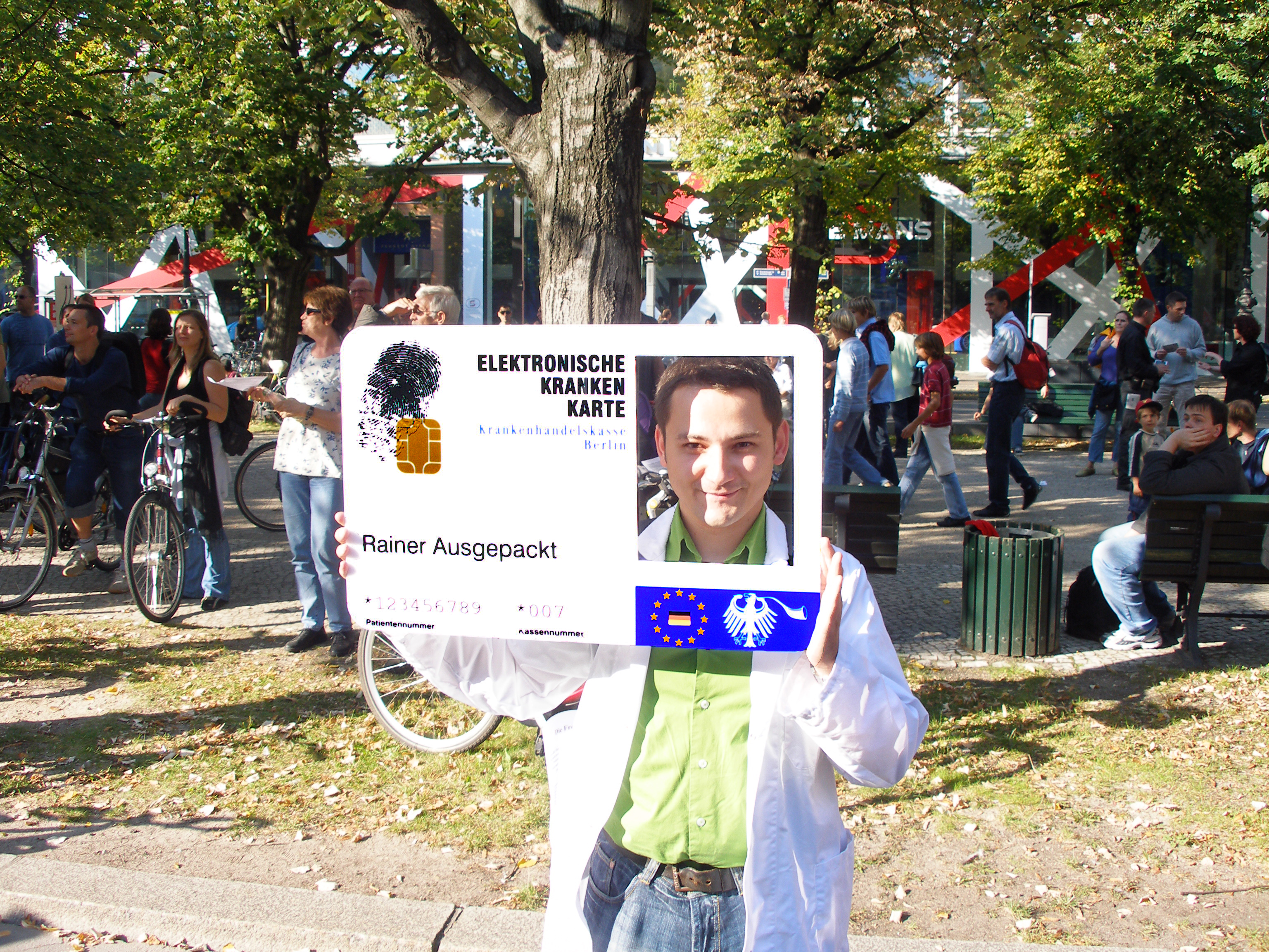 Die elektronische Gesundheitskarte IST der gläserne Patient.